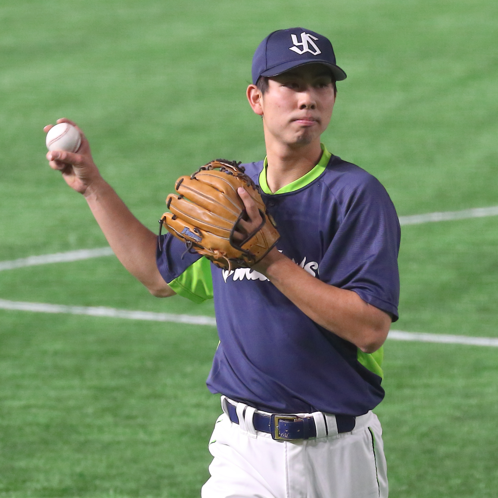 東京ヤクルトスワローズ時代の太田賢吾選手。2019年5月10日に東京ドームで撮影。